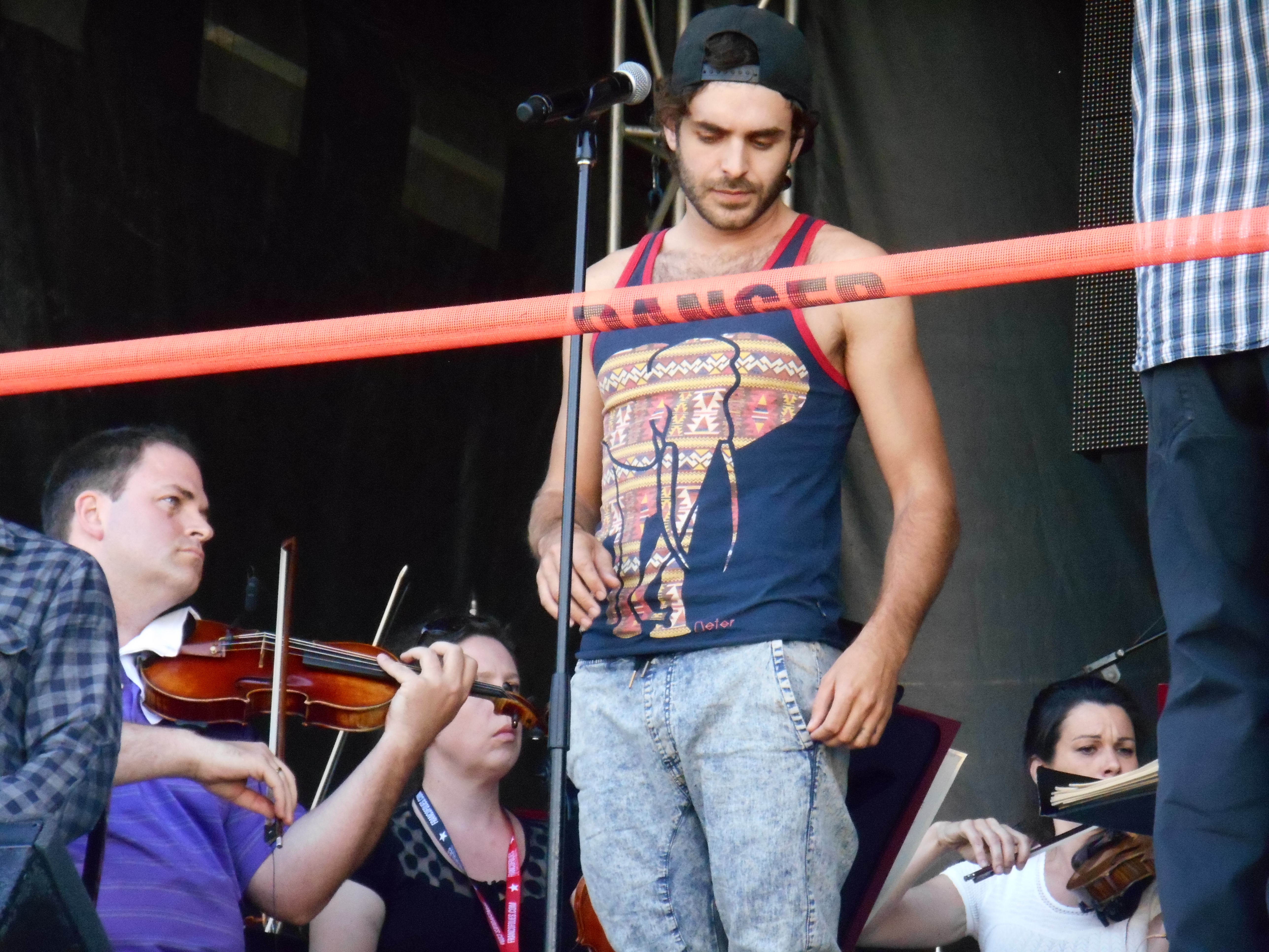 Alex Nevsky Répétition du spectacle La symphonie rapaillée, offert dans le cadre des FrancoFolies de Montréal, le 22 juin 2014